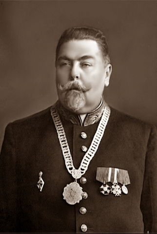 Михаил Даниилович Сквориков (1864-1926) - городской голова Екатеринодара (1912-1917).